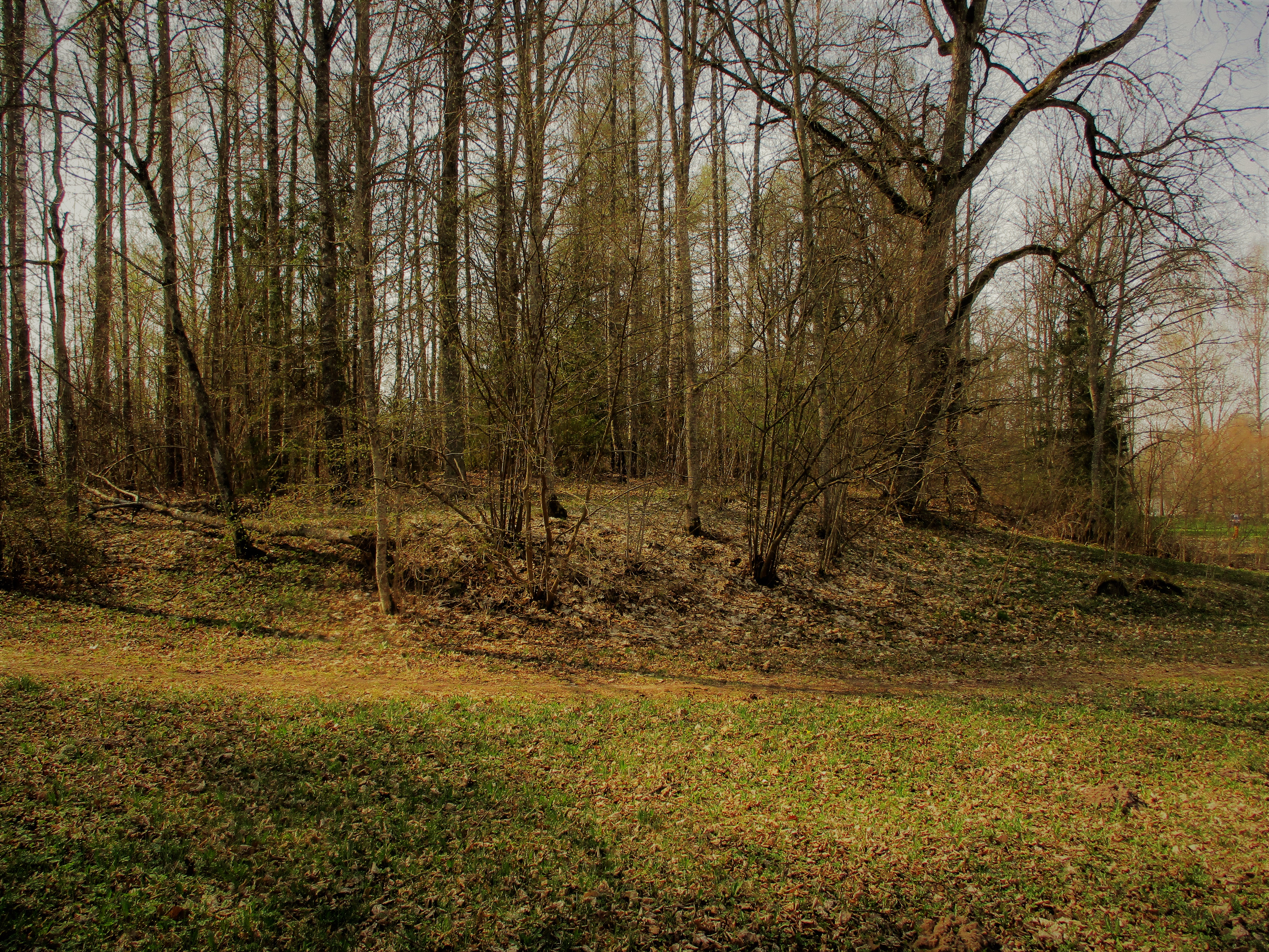 Vaade idasuunalt linnuseala kirdenurgale.